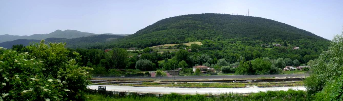 Vista della collina di Monteluco dalla zona della Rivera.